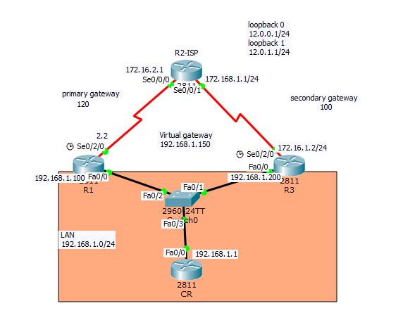 Монгол: jkjh